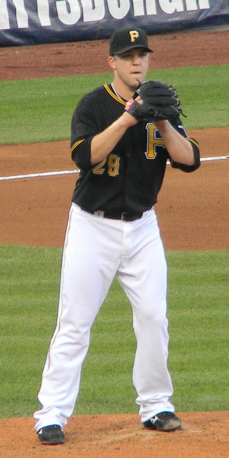 Paul Maholm